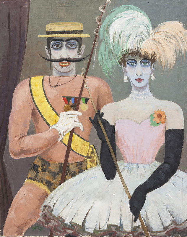 Werner Heuser (1880-1964) "Carneval" (1953) Öl auf Leinwand, 80 x 100 cm